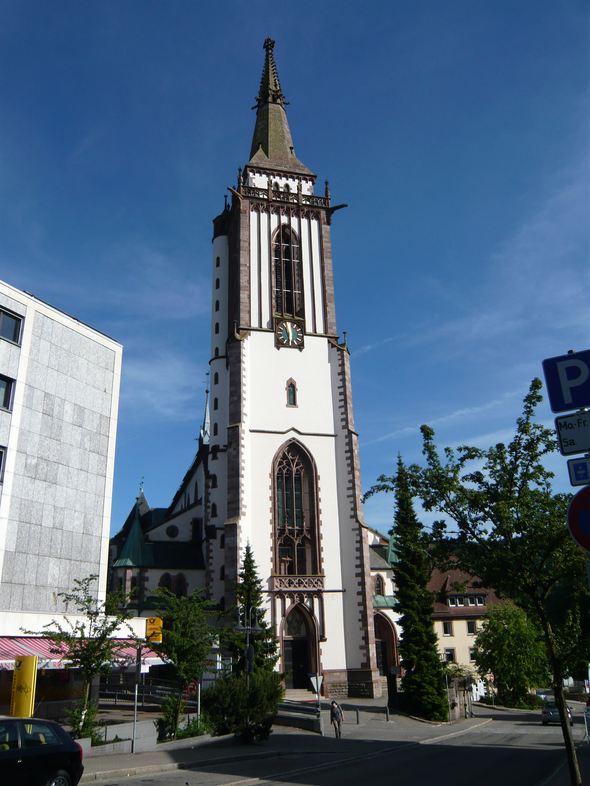 Das Neustädter St.-Jakobus-Münster von der Scheuerlenstraße aus gesehen